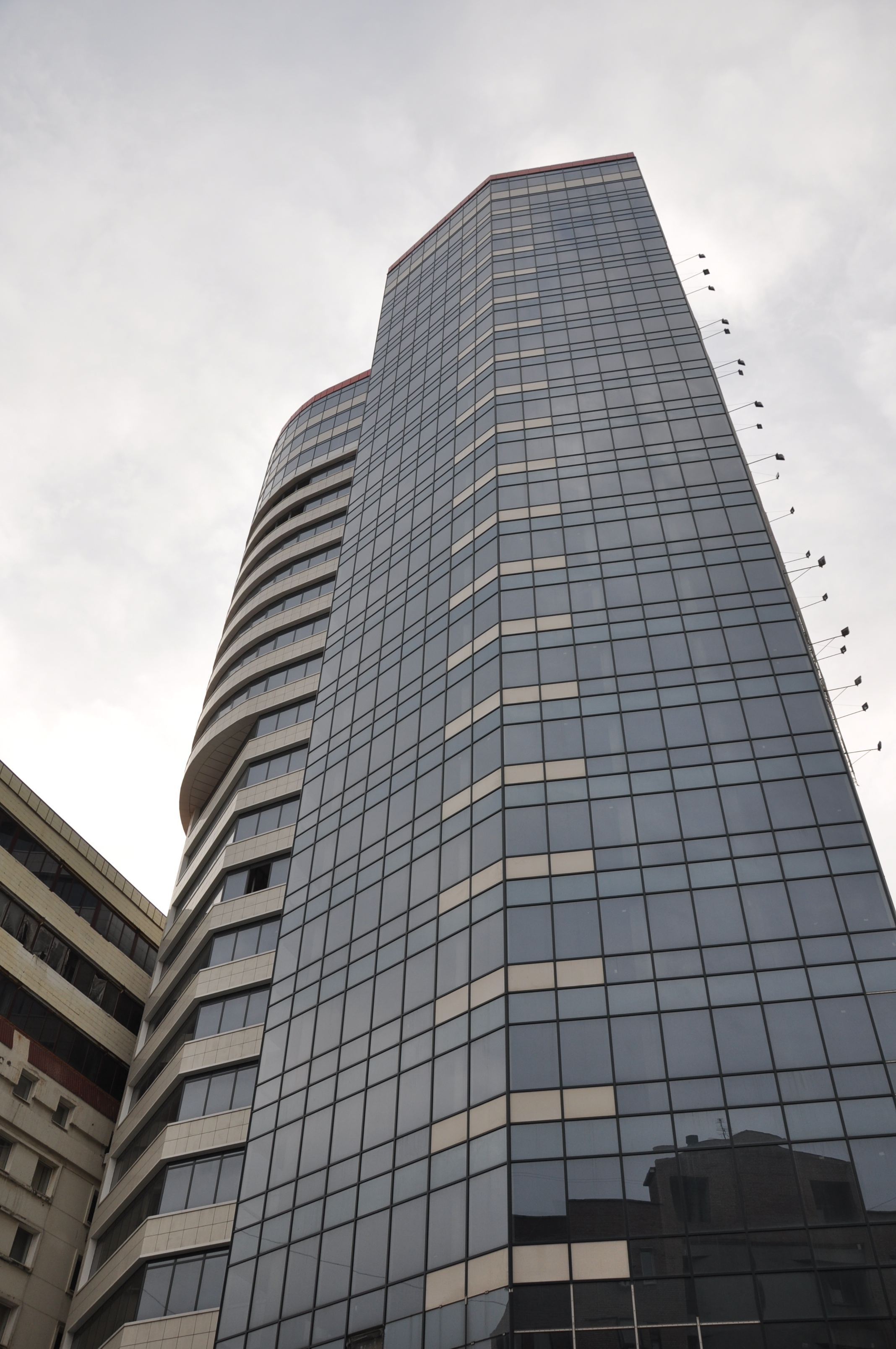 Донецк. Конгресс-холл